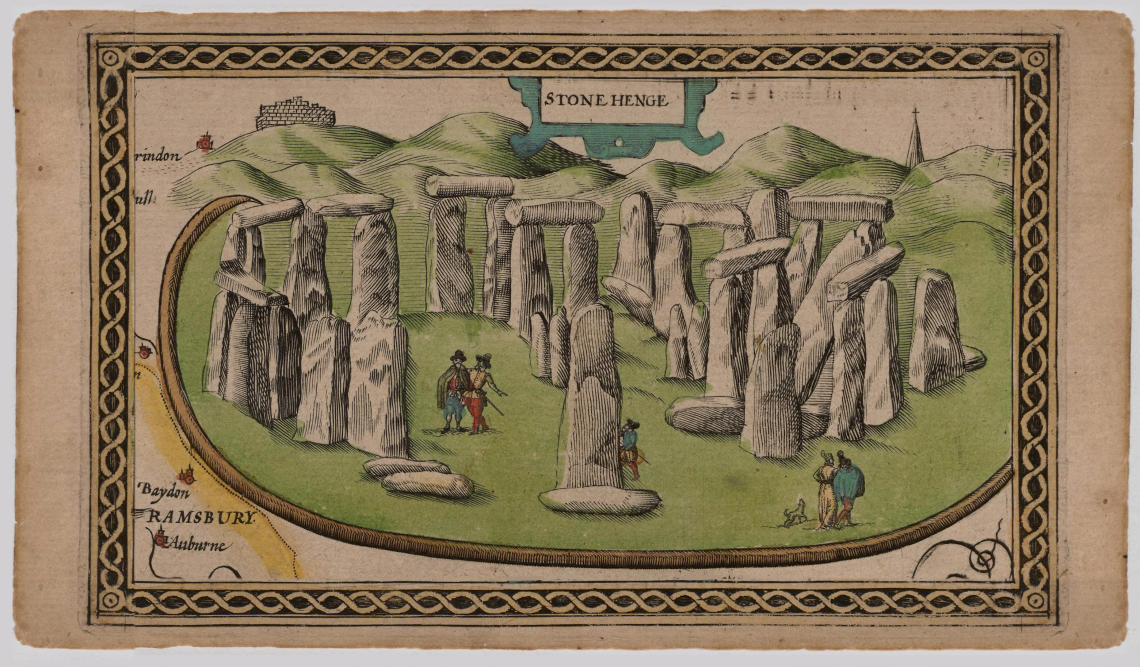 Bewerkt detail van de kaart van Wilshire